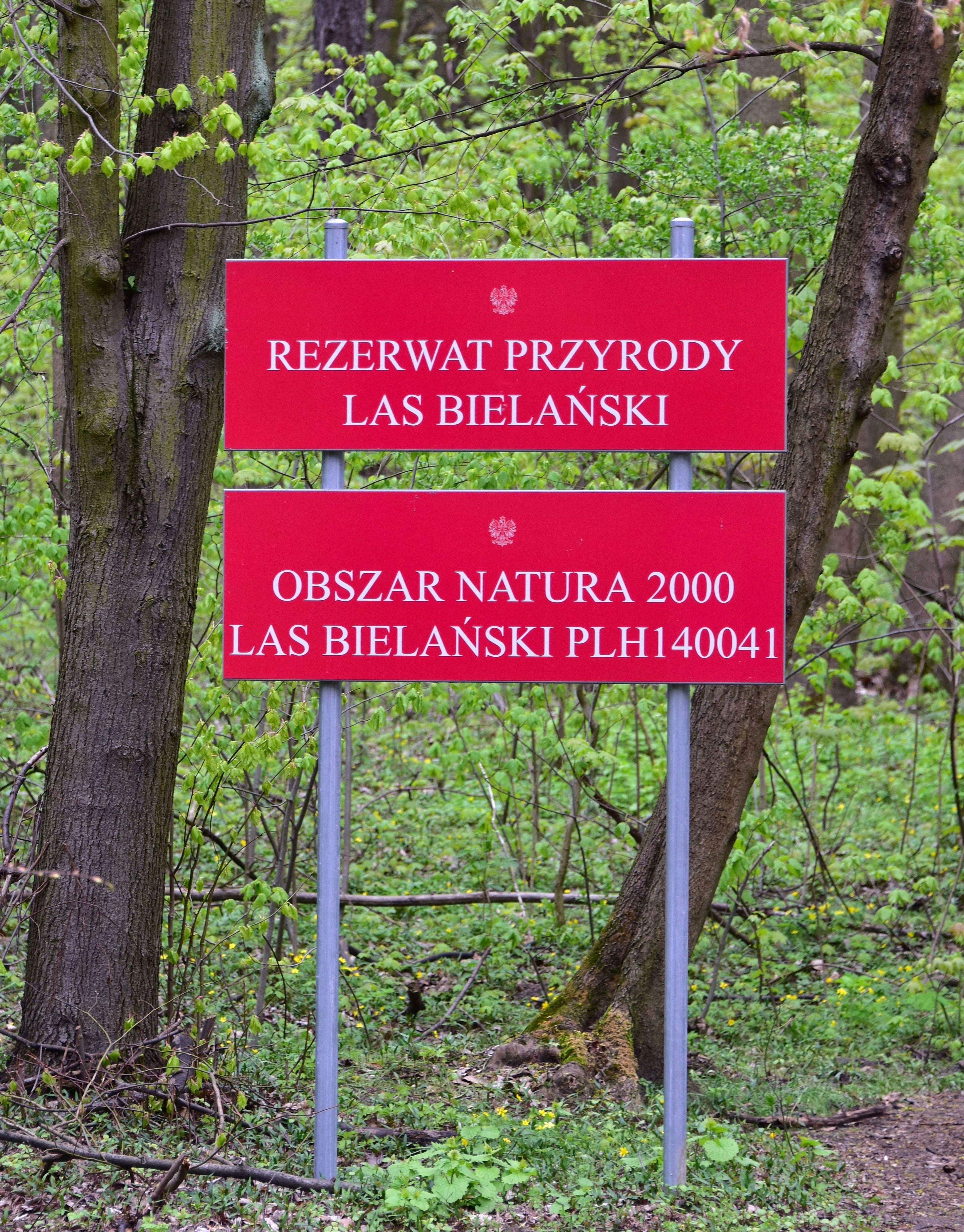 Tablica informacyjna przy ul. Dewajtis w Warszawie